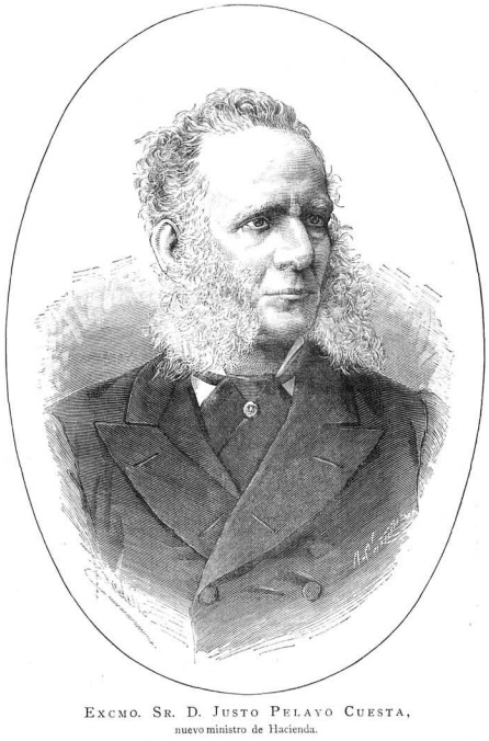 Excmo. Sr. D. Justo Pelayo Cuesta, nuevo ministro de Hacienda.